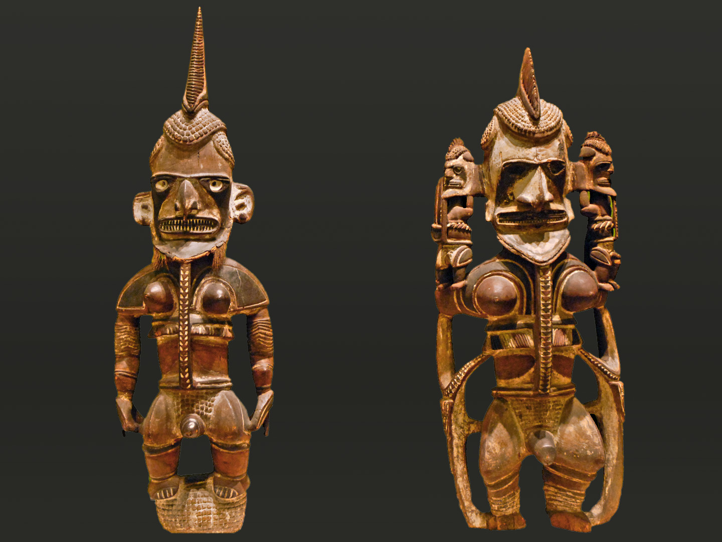 Statues Uli (musée de Dahlem, Berlin) Statues Uli Nouvelle Irlande, 19ème siècle, bois Collection Franke Musée d'ethnologie de Dahlem (partie mers du sud et Océanie) Berlin Le caractère hermaphrodite des statuettes Uli a contribué à leur collecte par les européens dès le début du 20ème siècle. Elles n'étaient montré que lors des grands rituels funéraires, durant le reste de l'année, elles étaient conservées dans les "maisons des hommes".